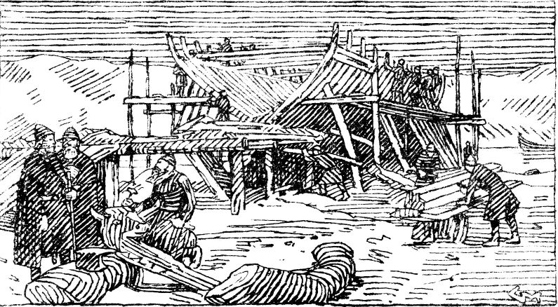 Gerhard Munthe: Illustration for Olav den helliges saga, Heimskringla 1899-edition. nn: «Kong Olav let byggje i Visunden.»